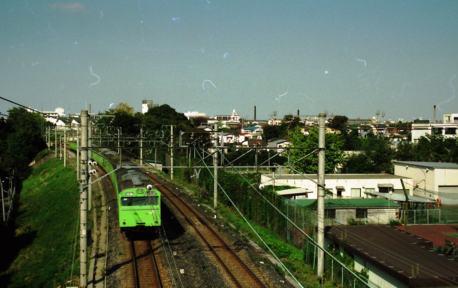 板橋4丁目付近の埼京線（赤羽線）